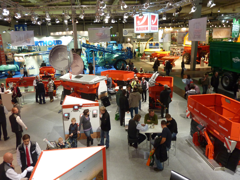 RAUCH Stand auf der Agritechnica 2011